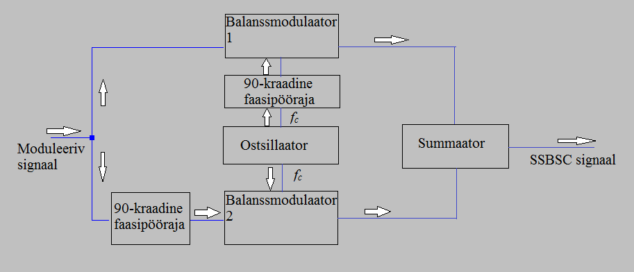 Faasimeetodi skeem